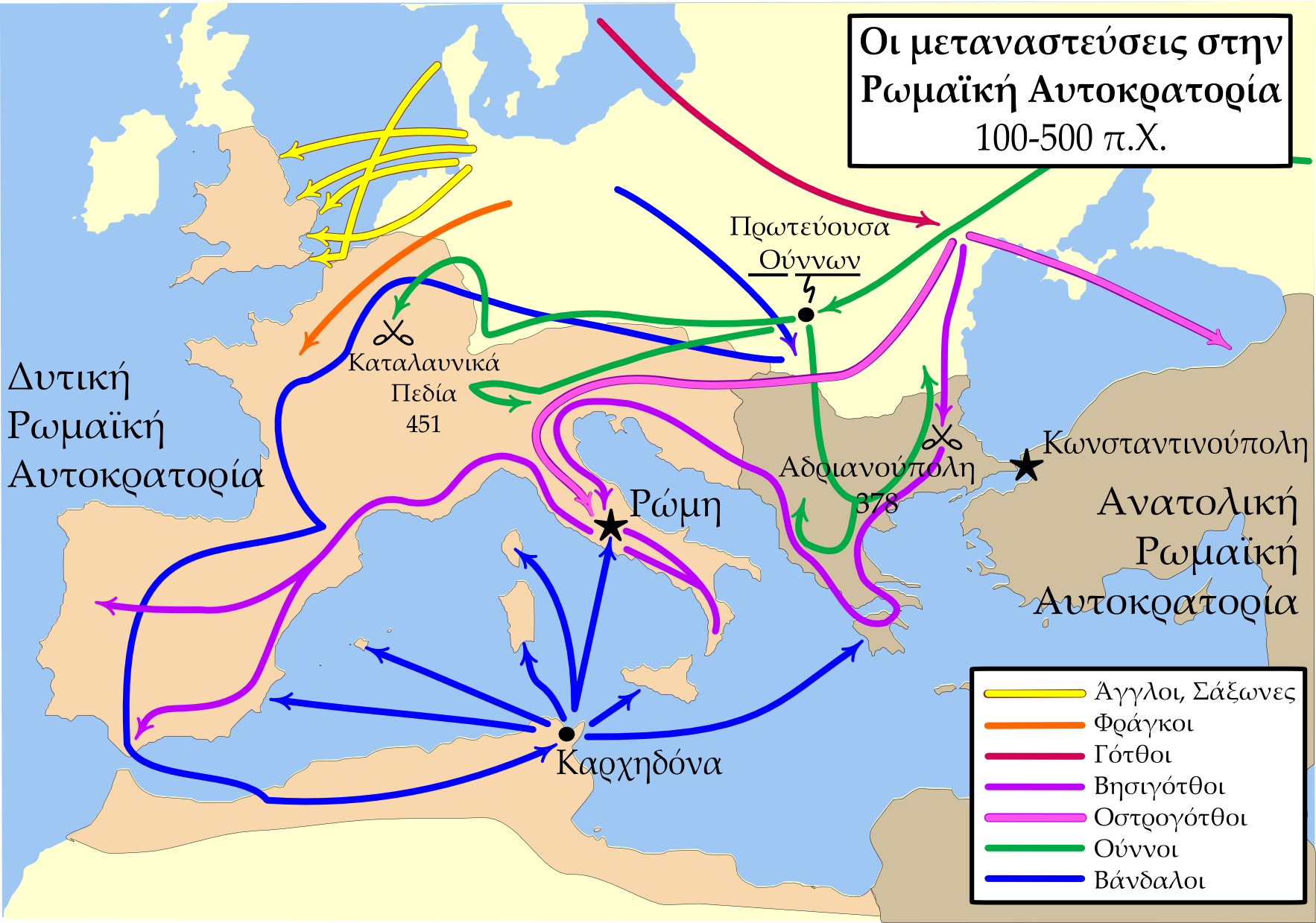 Χάρτης των "βαρβαρικών" εισβολών στην Ρωμαϊκή Αυτοκρατορία, που δείχνει τις κυριότερες μετακινήσεις από το 100 εώς το 500 μ.Χ.